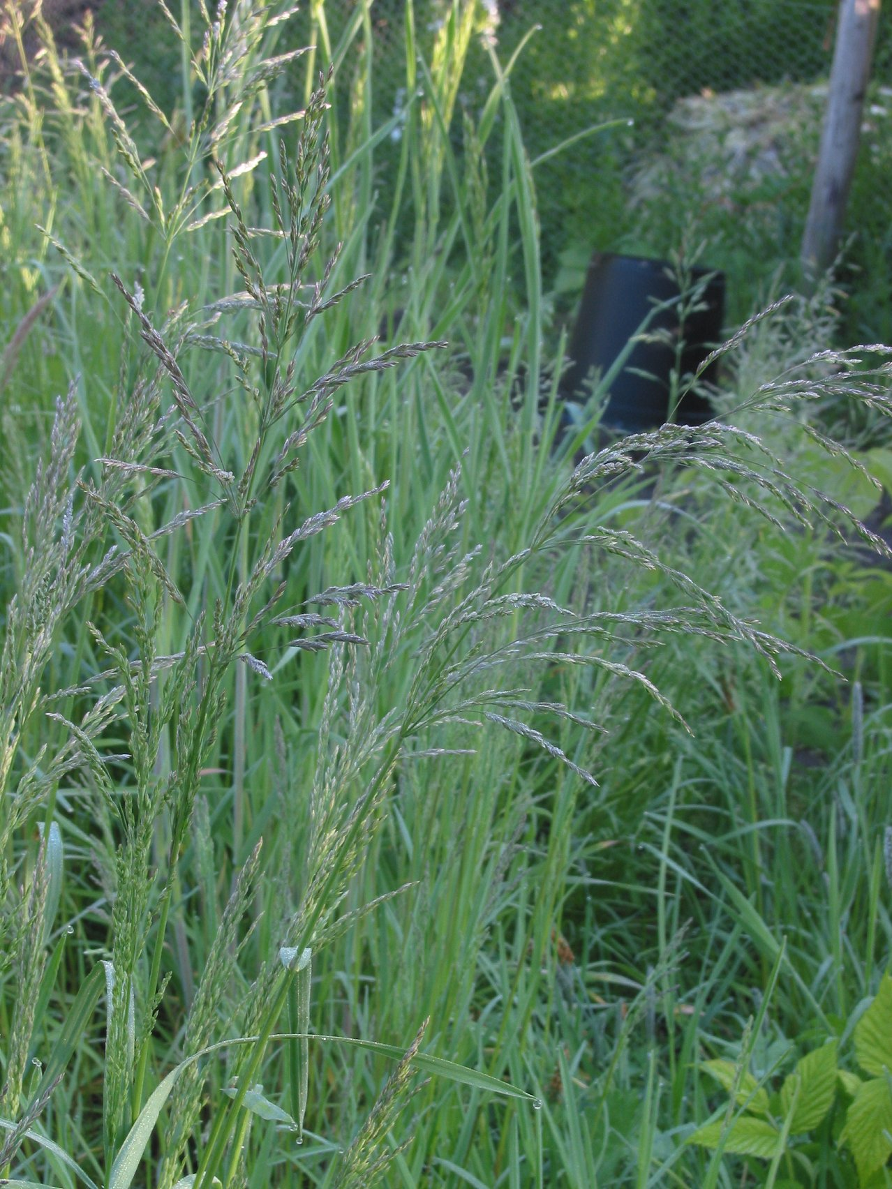 Poa trivialis flowers (Ruwbeembgras bloeiwijze)